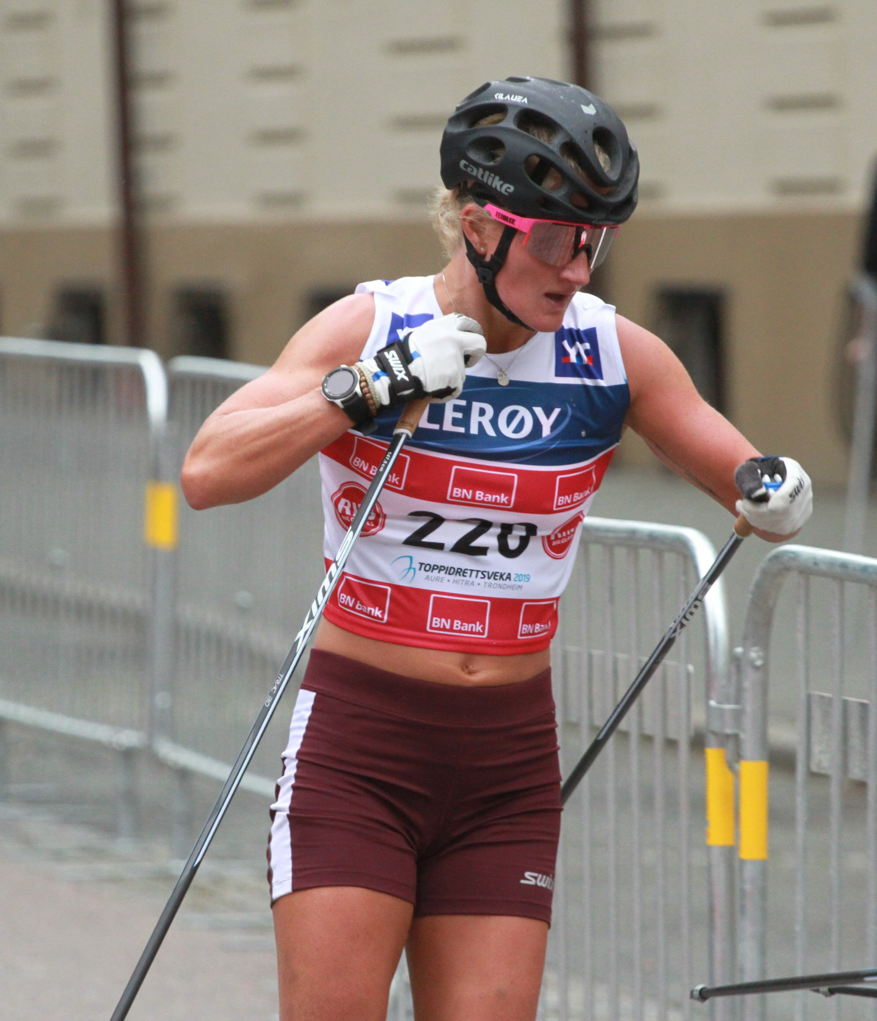 Toppidrettsveka 2019 i Trondheim - Kathrine Harsem